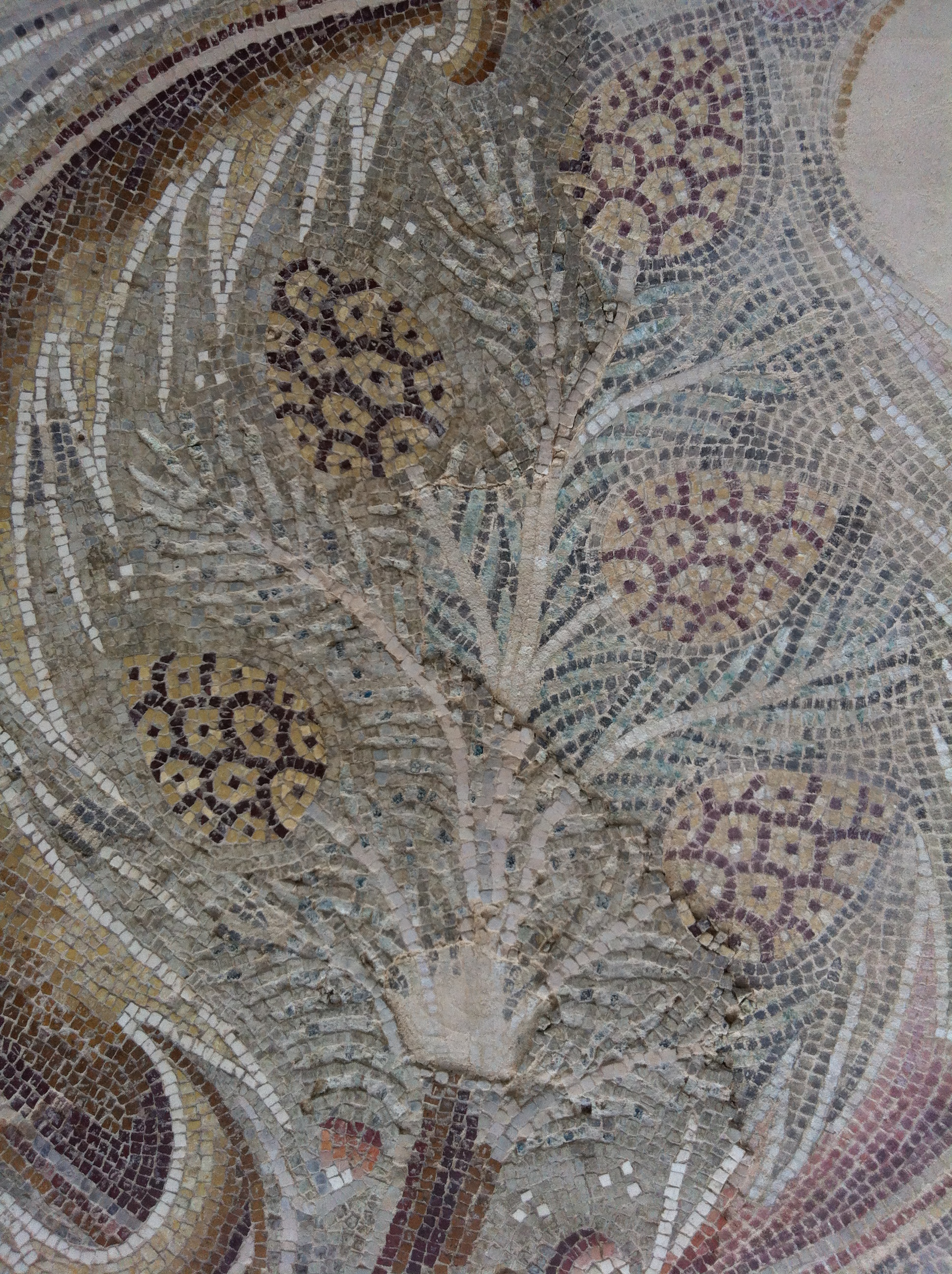 אורן הצנובר